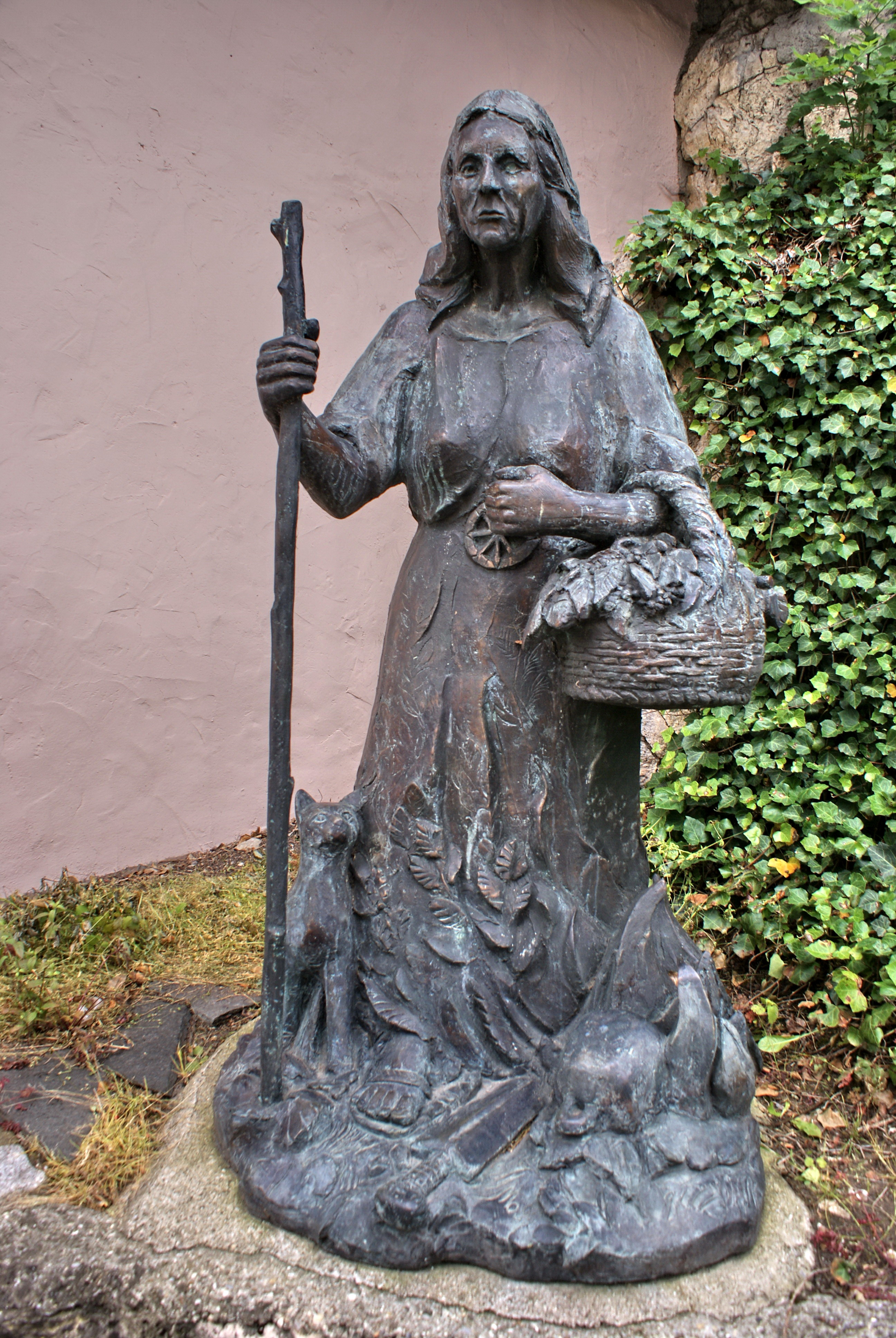 Die Bader-Ann aus Veringenstadt 1680 als "Hexe" verurteilt und hingerichtet. Das Protokoll des Prozesses befindet sich im Stadtarchiv Veringenstadt.